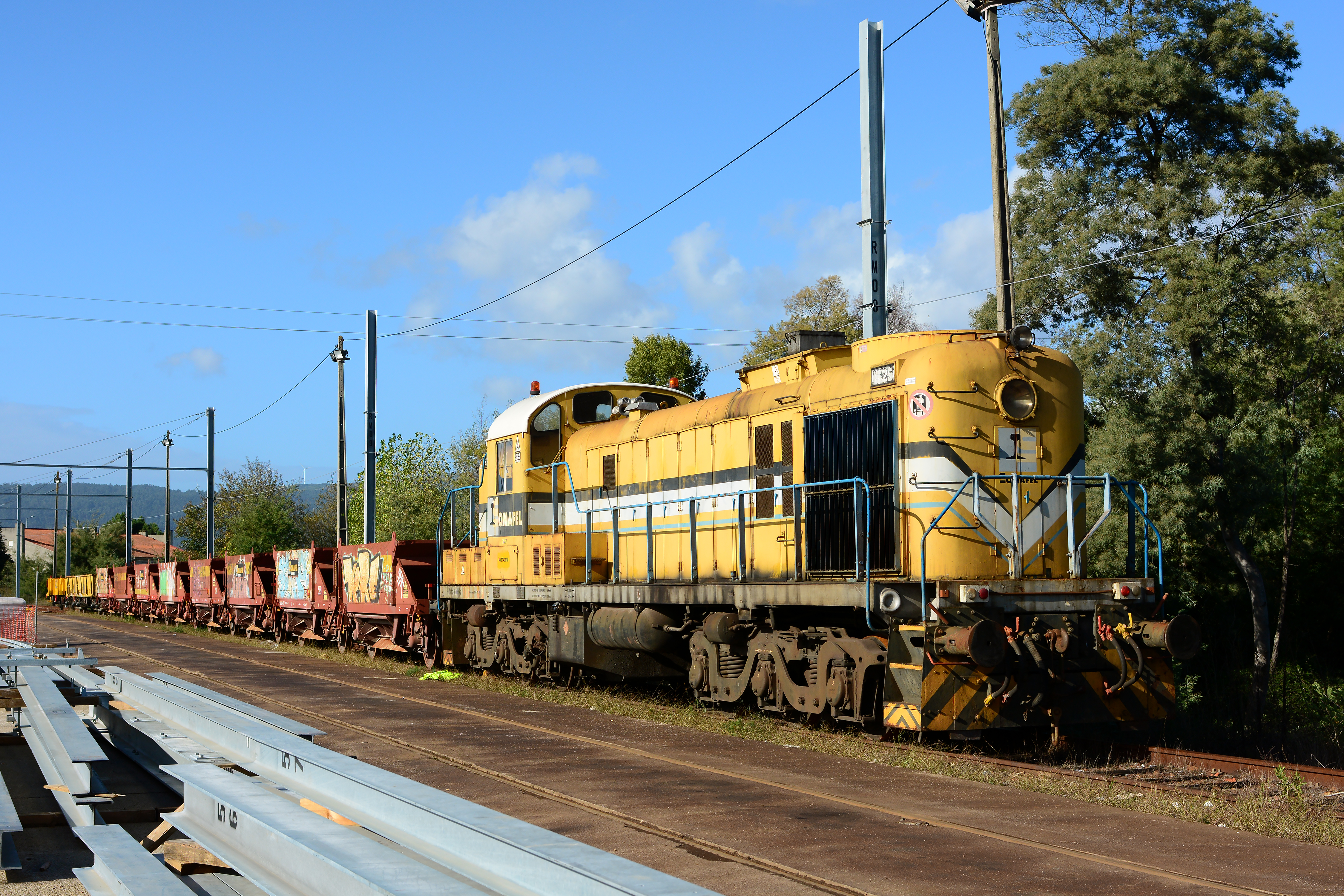 Somafel 1525